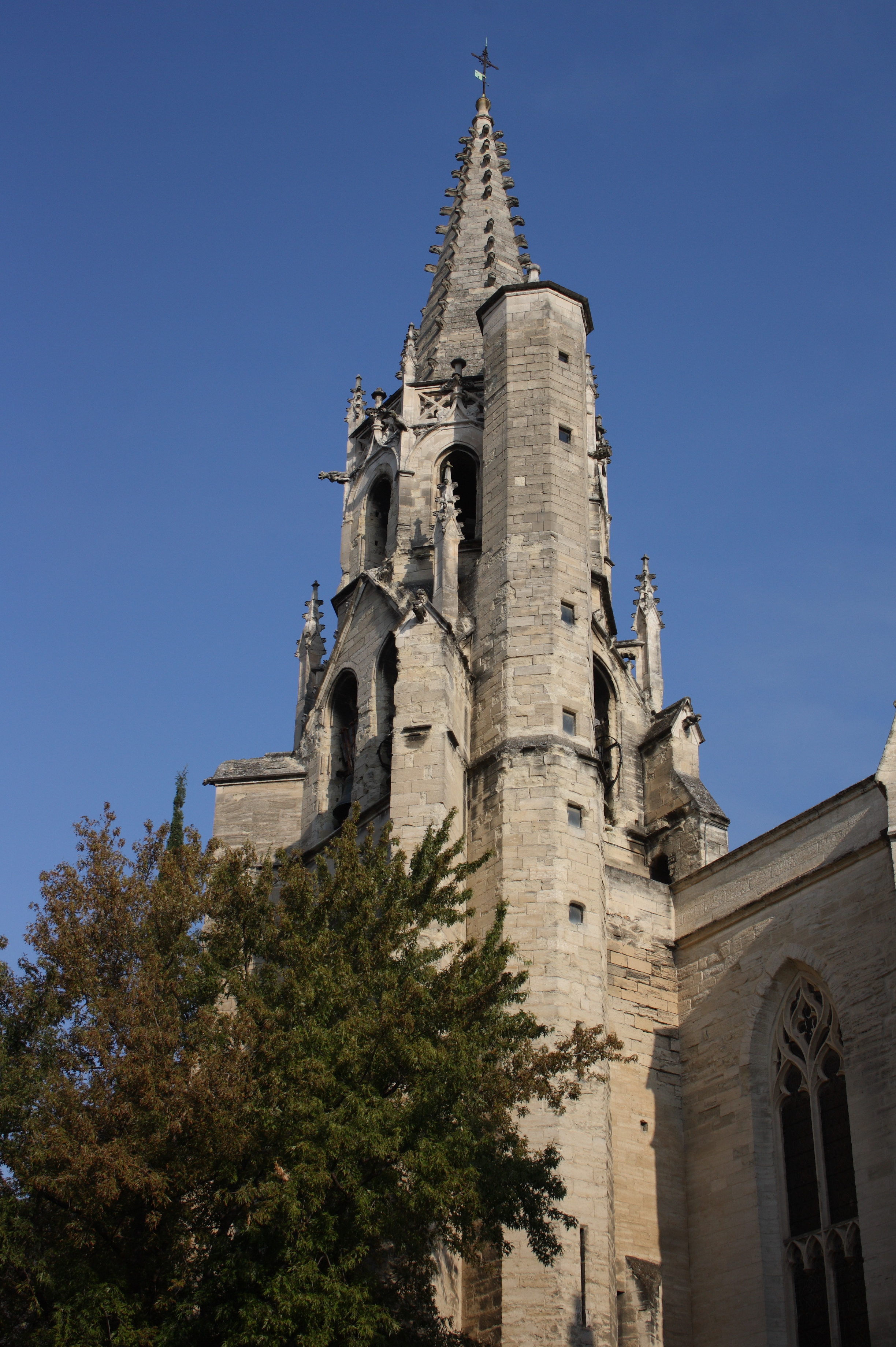 Katholische Kirche Saint-Pierre in Avignon, Glockenturm